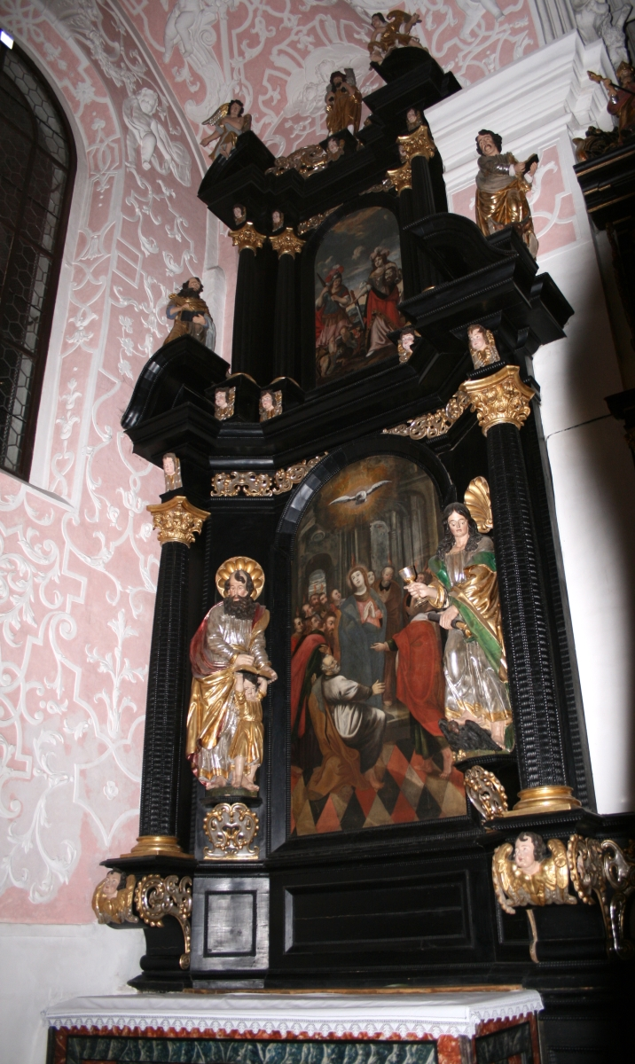 RKT Akademska crkva sv. Katarine. Kapela Duha Svetoga posvećena je tajni duhovskoga blagdana, kada su apostoli deset dana nakon Kristova uzašća primili milost nadahunća treće božanske osobe. Zato je stuccodekorator izradio na zidu nasuprot oltara reljef uzašća Isusova. Radi toga su na oltaru i kipovi četiri evanđelista: Mateja, Marka, Luke i Ivana. Radi toga je vjerojatno također na vrh oltara stavljen kip "Dobrog pastira", koji ostaje sa svojima, djelovanjem milosti Duha Svetoga "u sve dane do svršetka svijeta". Nad oltarnom slikom, koja prikazuje biblijski momenat prosvjetljenja apostola na blagdan Duhovski, nalazi se slika koja prikazuje starozavjetnu biblijsku ženu Juditu s glavom Holoferna i legendarnog sveca viteza svetog Jurja, zatirača novozavjetne poganske aždaje. Kapela potječe po predaji iz 1670. godine, dok ju je godine 1721. dao na svoj trošak ukrasiti zagrebački biskup Andrija Gerličić, kako piše na natpisu iznad nje. Ovaj oltar, kao i njegov pendant na desnoj strani crkve, radio je po predaji 1675. godine varaždinski drvorezbar - kipar Jakov Altenbach. Isti je majstor, sudeći po sličnosti kompozicije i tehnike, izradio i barokni oltar Žalosne Gospe u Lepoglavskoj crkvi.